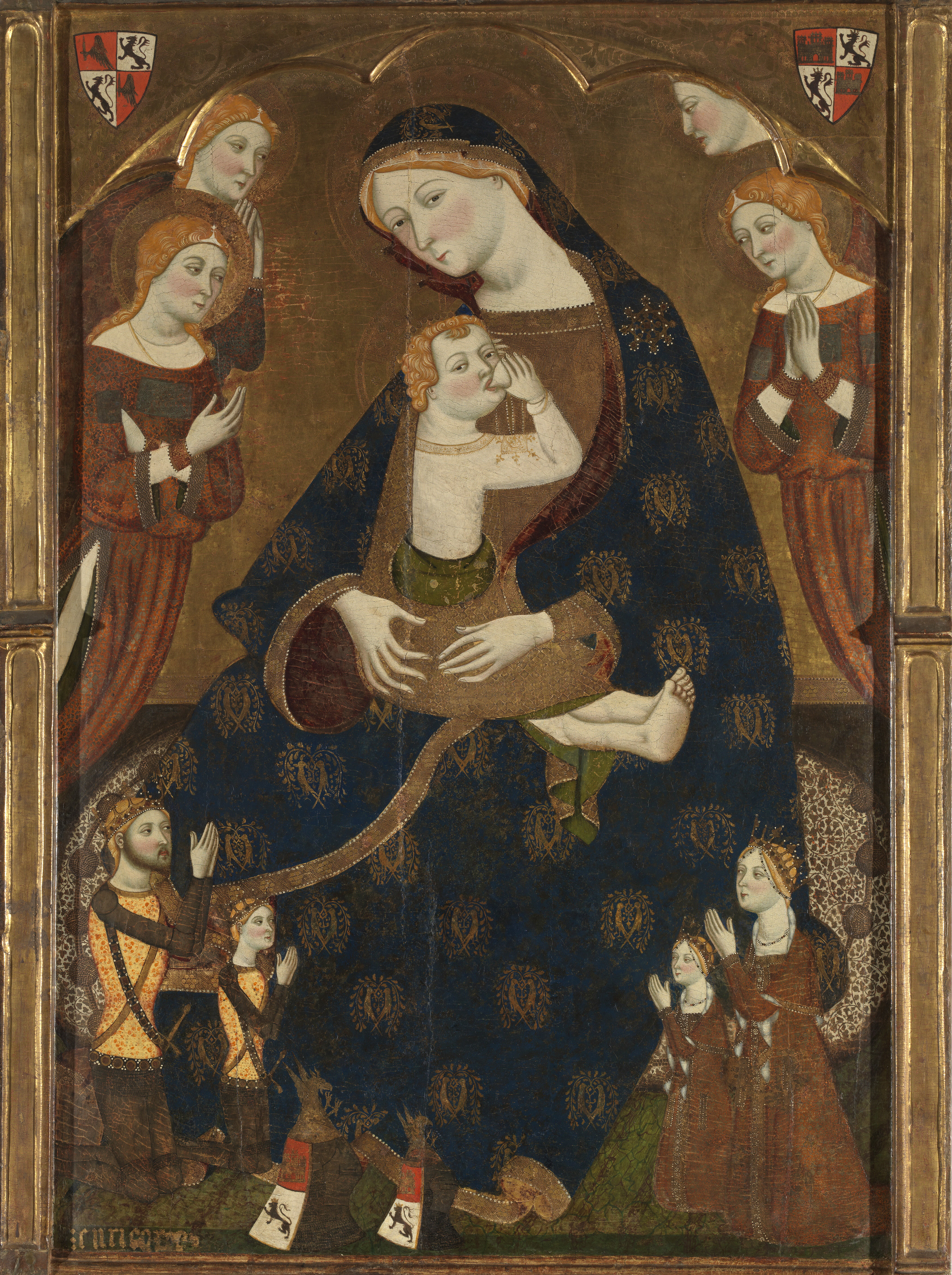 La obra muestra a la Virgen María llevando en sus brazos al Niño Jesús, y a sus pies aparecen el rey Enrique II de Castilla y el infante Juan, que llegaría a reinar como Juan I de Castilla, y también la reina Juana Manuel de Villena junto a una de sus hijas, que tal vez sea Leonor o Juana.